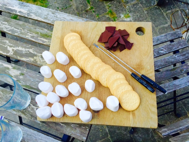 Marie Kiks, chokolade og skumfiduser